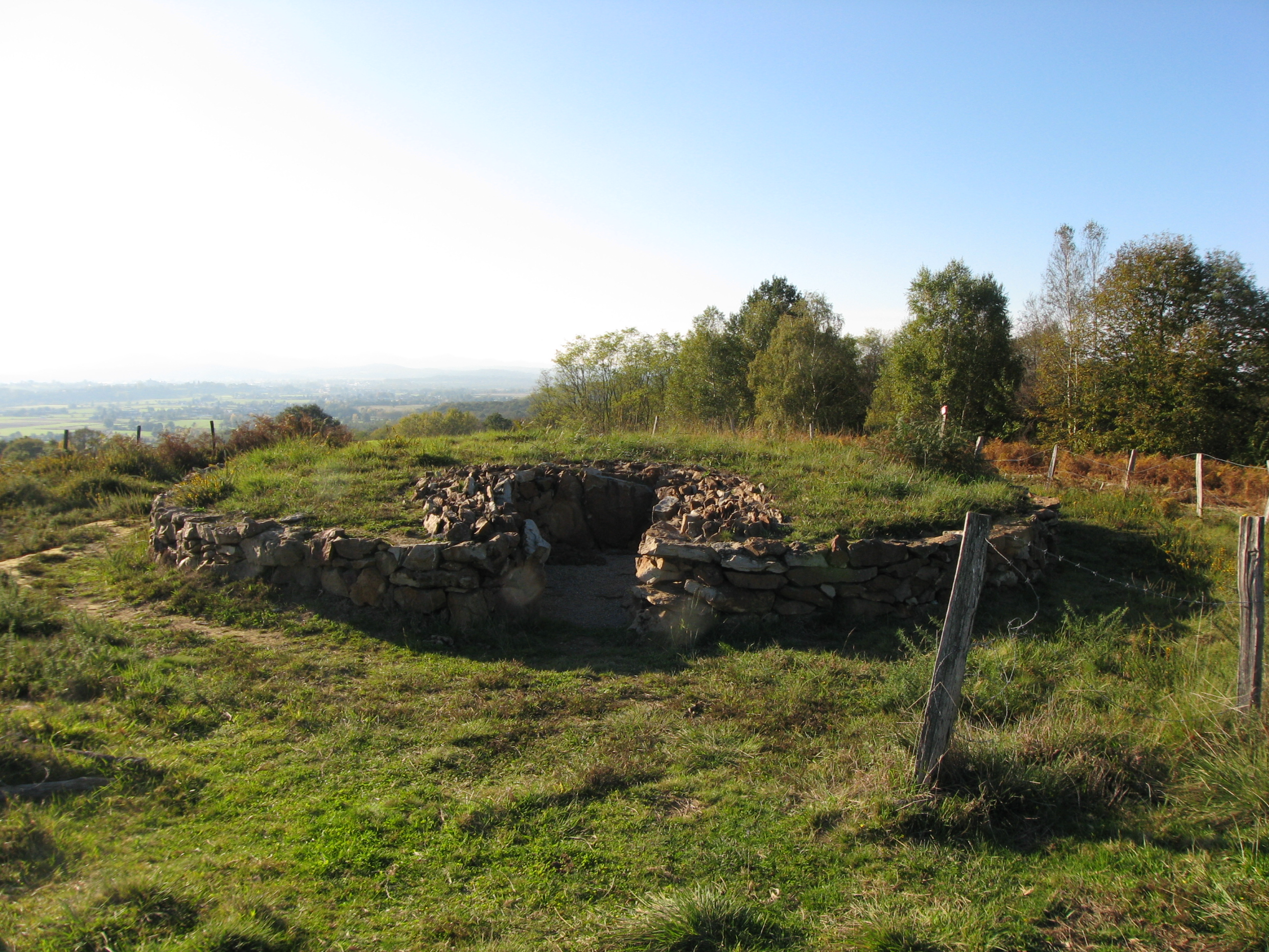 Vue de l'entrée du tumulus d'Escout (pyrénées Atlantiques) Pyrénées).